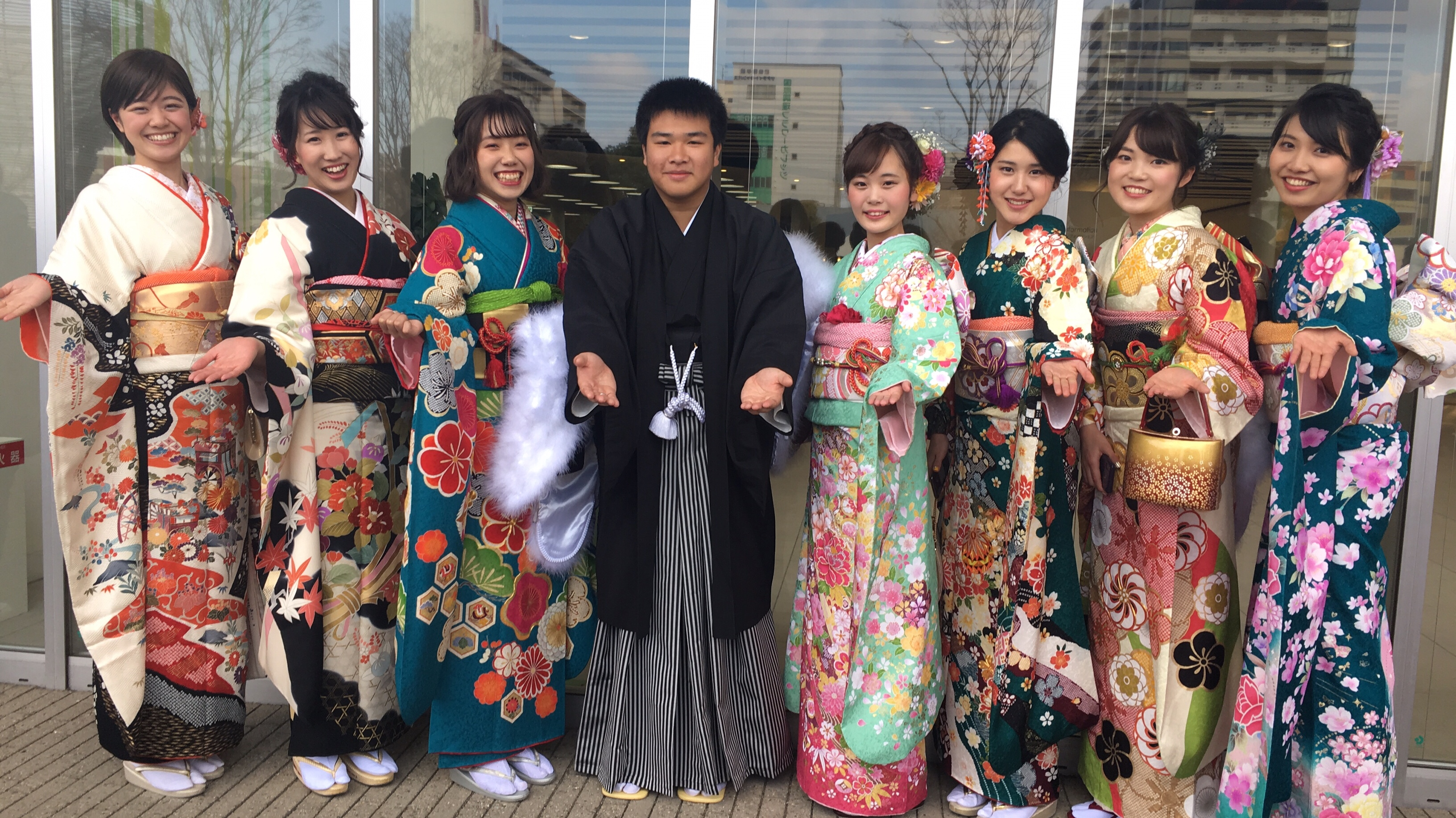 中文（台灣）: 大分市成人禮紀念集會。當中男性的參加者為澳門的梁君培牧師。